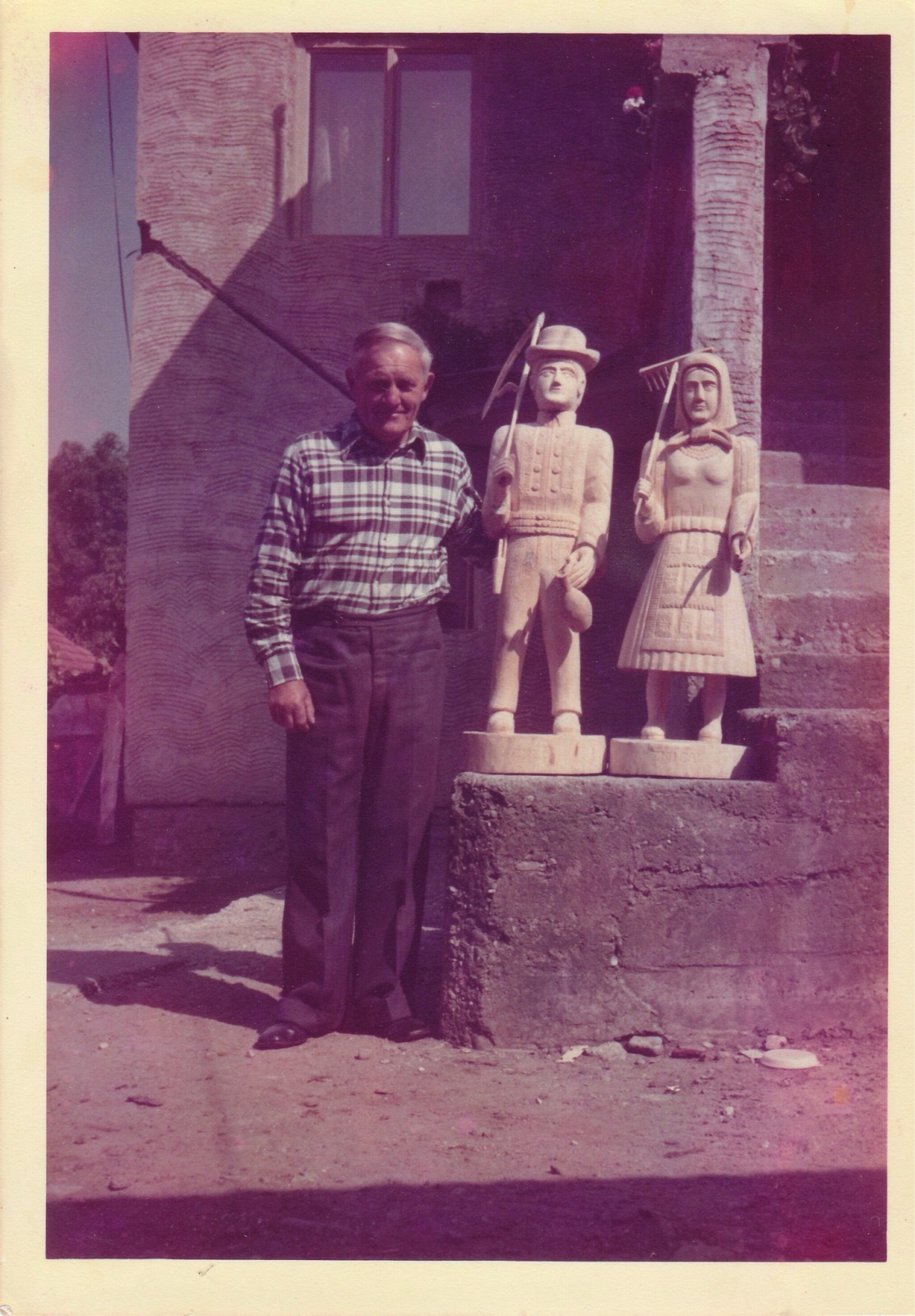 Ľudový rezbár